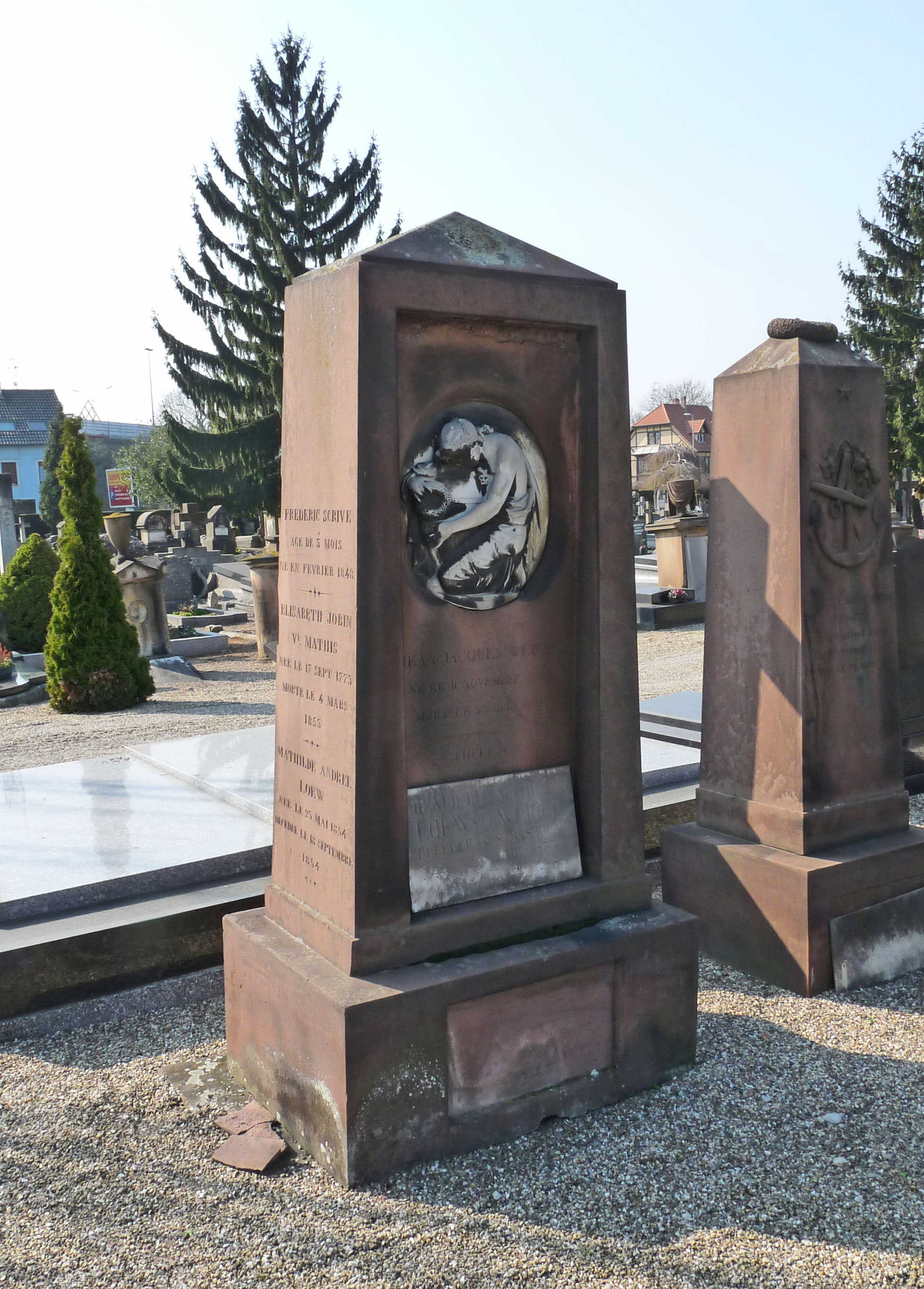 Obélisque en grès rose, tombe de Jean-Jacques Weigel (1784-1836), notaire et conseiller municipal, au cimetière Sainte-Hélène de Strasbourg. Le médaillon ovale est signé "A. Frie." (Friederich)